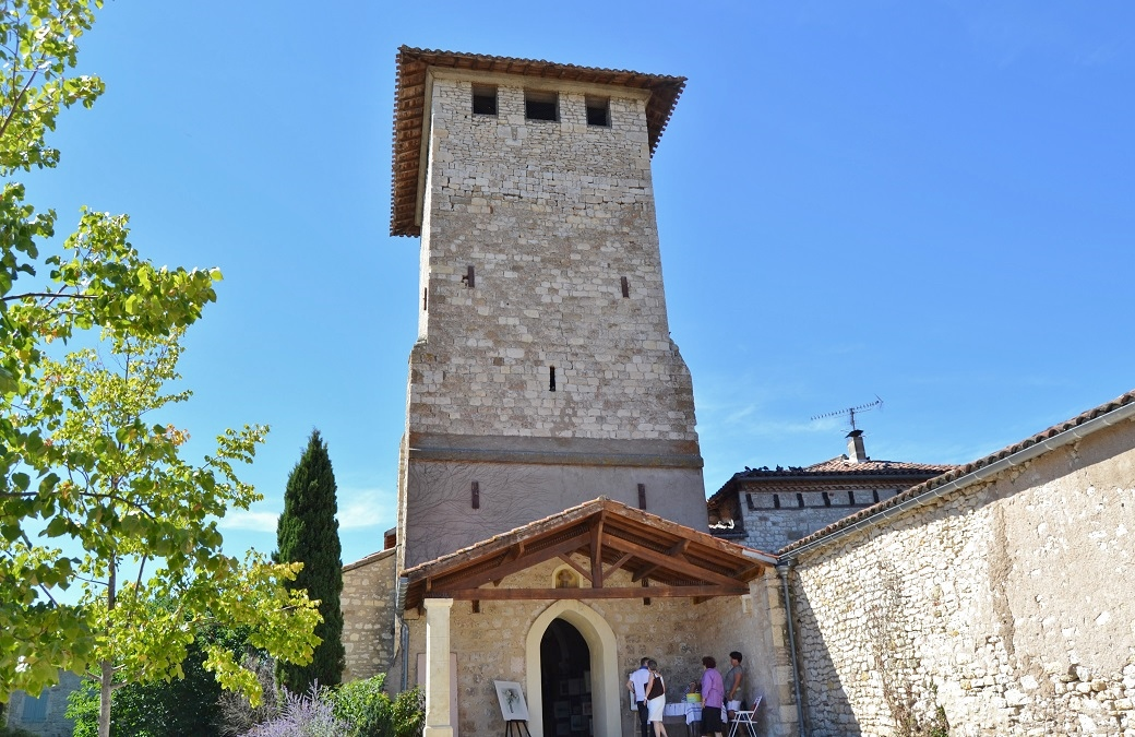 église Saint Benoit